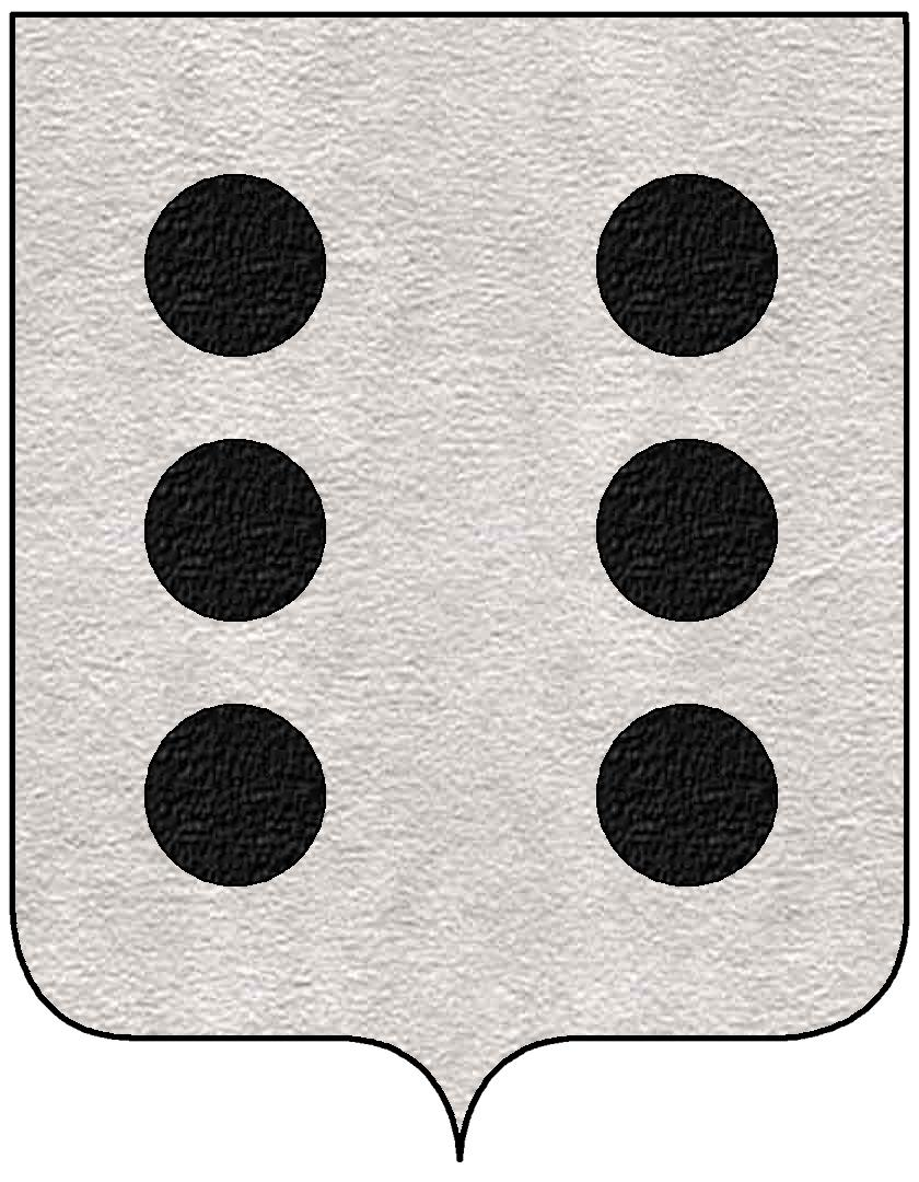 Stemma della famiglia Alagon